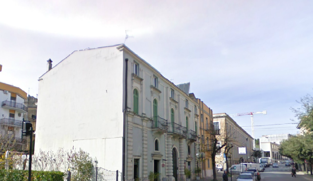 L'abitazione, con chiesa annessa (anche se non visibile in questa foto), dove "il Monaco Bianco" risiedette fino al ventotto Dicembre del 1959, data della sua morte.